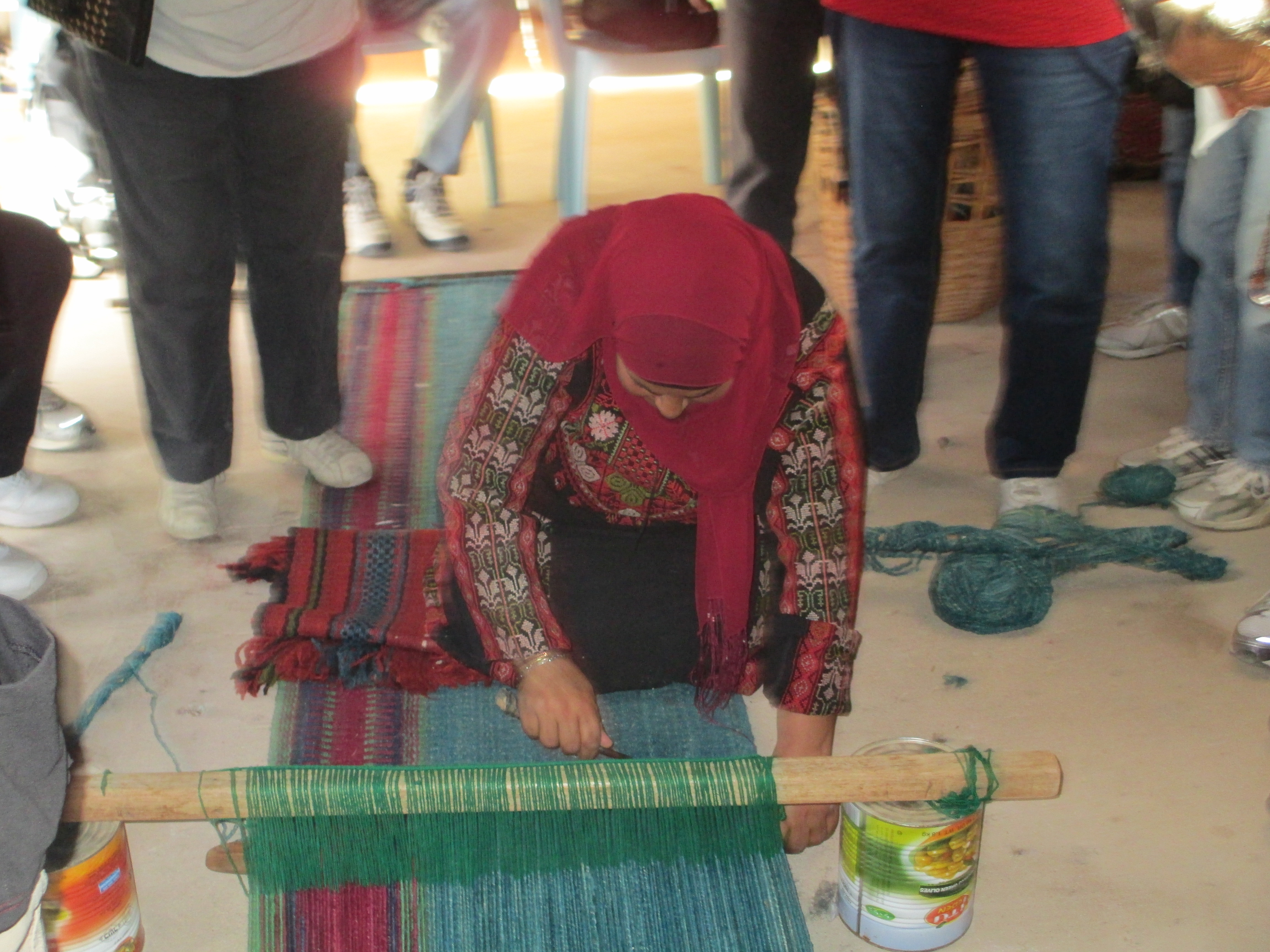 מפעל האריגה בלקיה